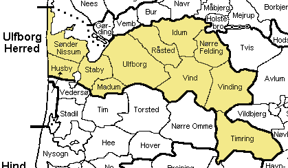 Ulfborg Herred, Ringkøbing Amt, Denmark Map by Svend-Erik Christiansen , edited by Nico-dk.